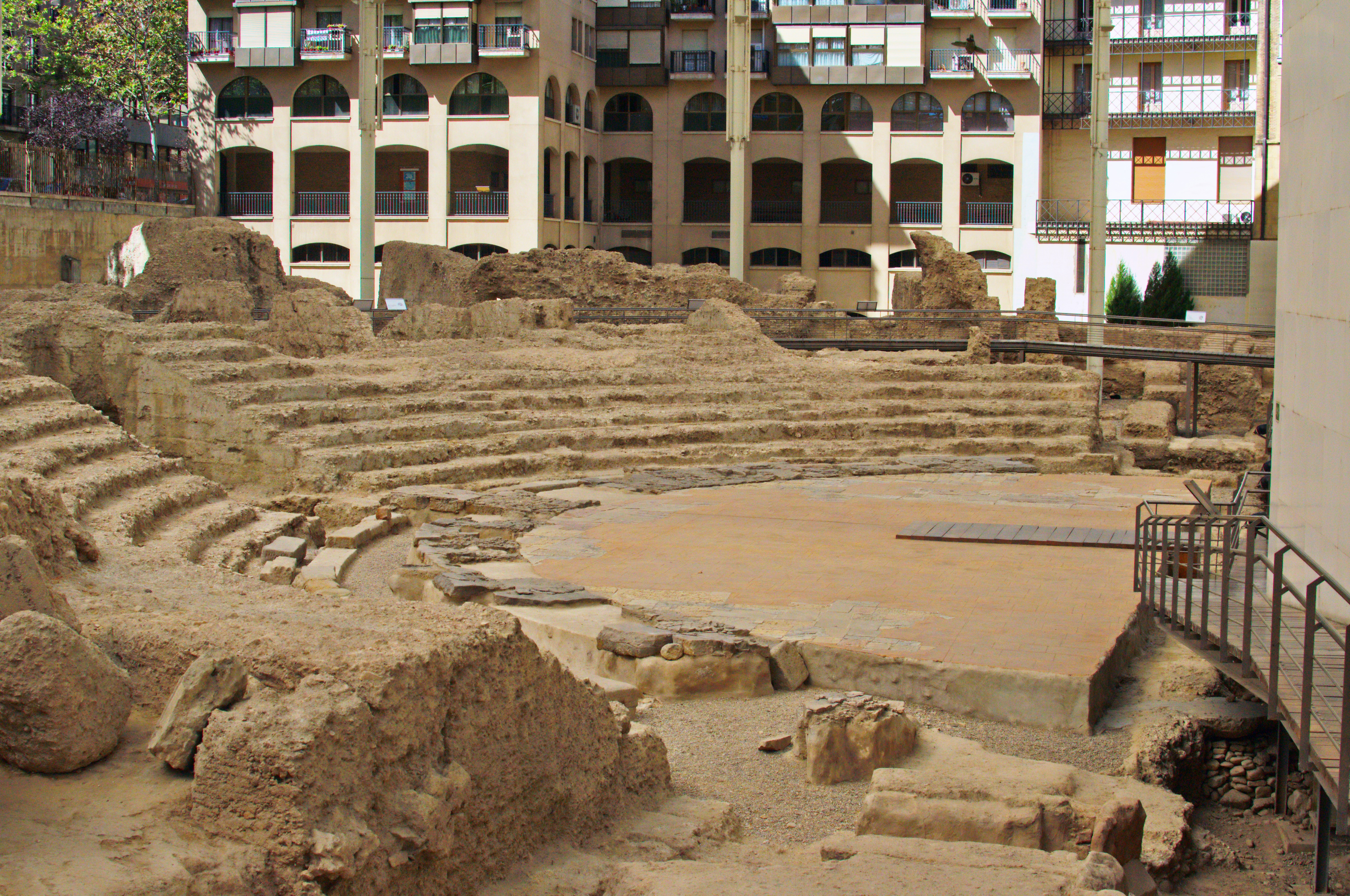 Teatro romano de Caesaraugusta (Zaragoza).